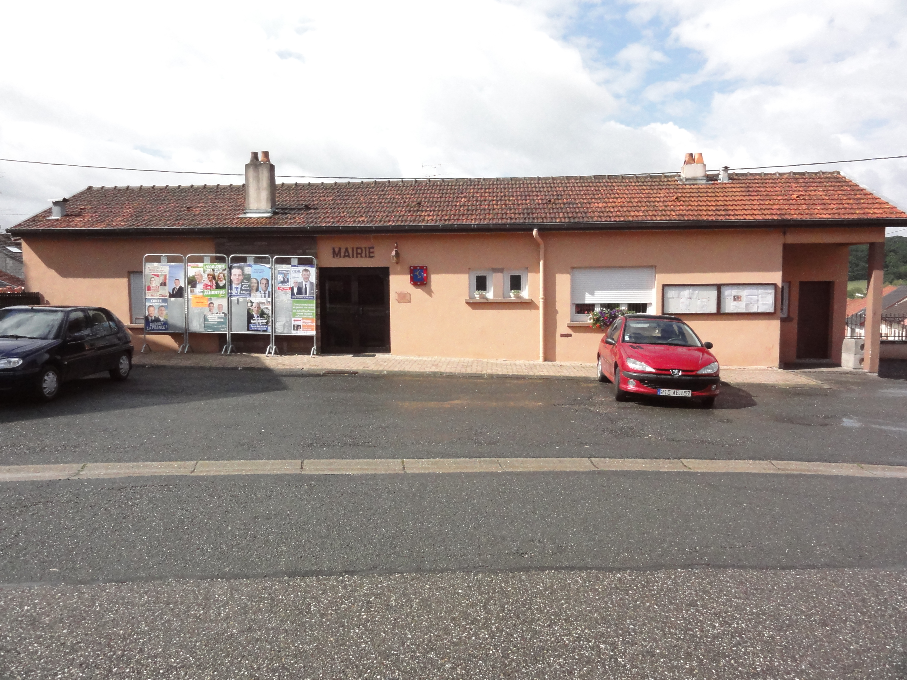 Sarraltroff (Moselle) mairie